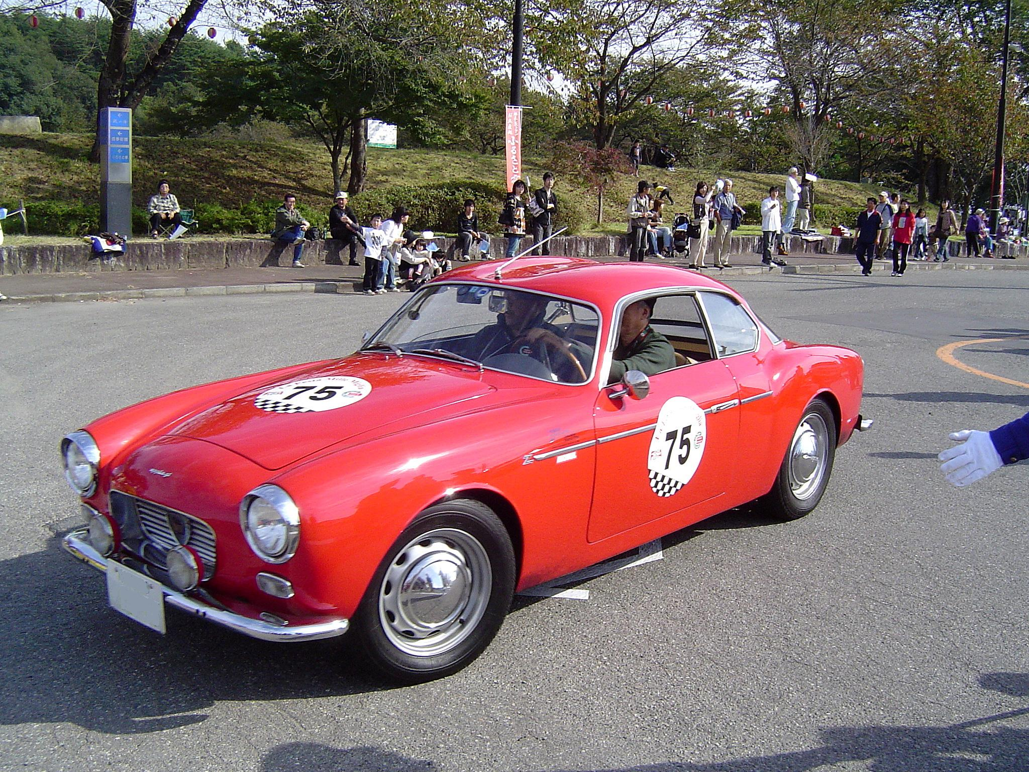 Lancia Appia Zagato GT, su base "Appia 2ª serie" (1957-1958)